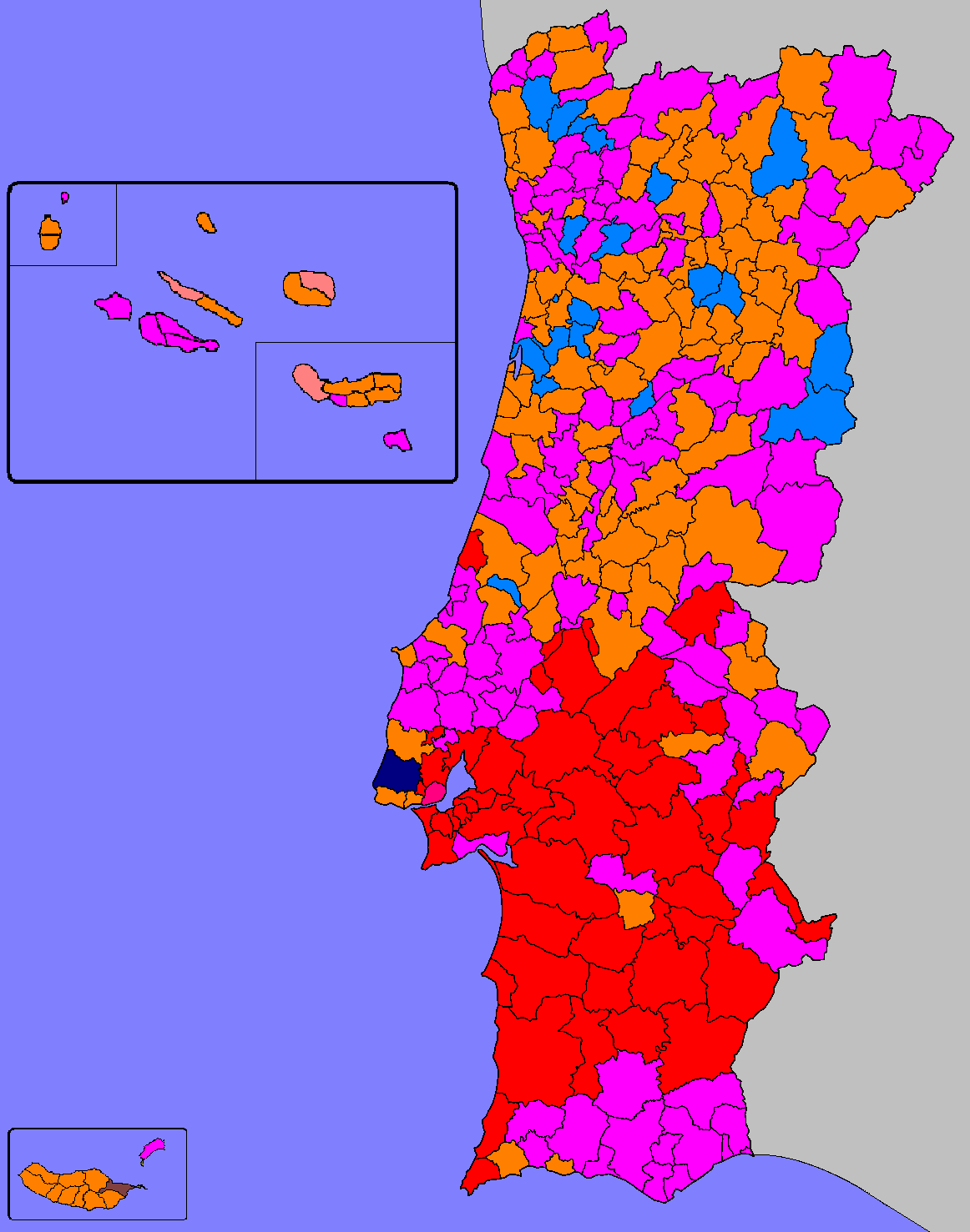 Mapa ilustrativo do partido mais votado por Concelho (Câmara Municipal)